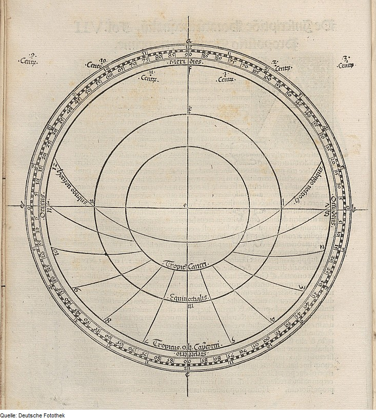 Original image description from the Deutsche Fotothek Astronomie & Sternkarte & Messinstrument